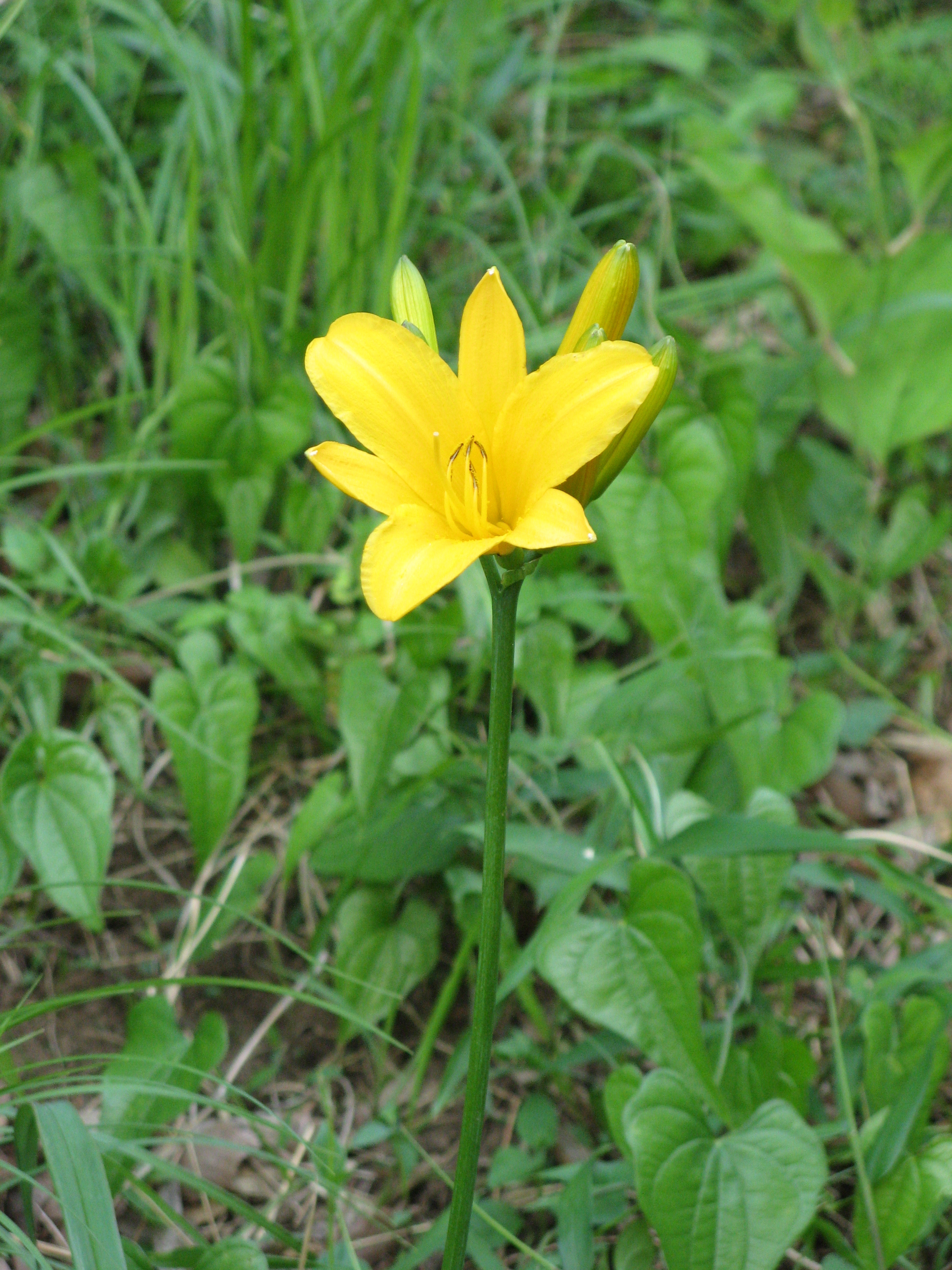 Hemerocallis middendorfii var. esculenta f. musashiensis(Mt. Sengen)